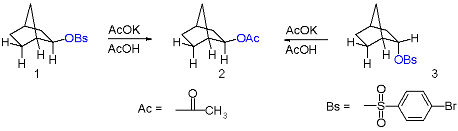 Norbornyl brosylate solvolysis